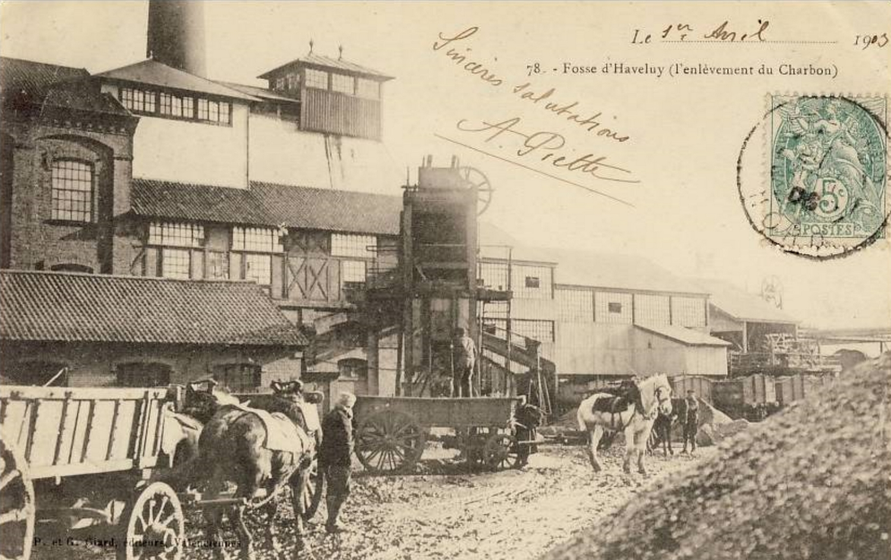 Fosse Haveluy de la Compagnie des mines d'Anzin, Haveluy, Nord, Nord-Pas-de-Calais, France.